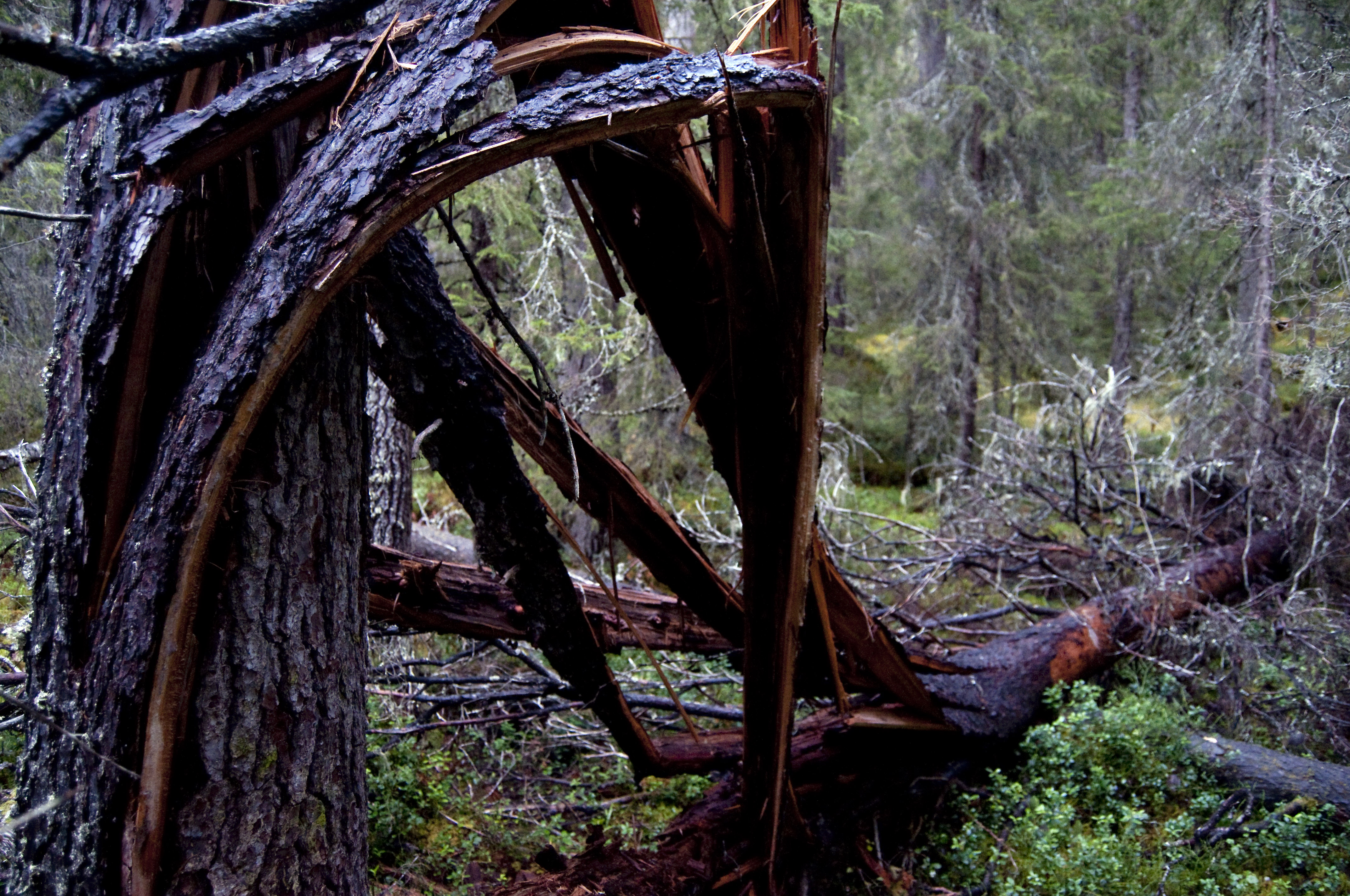 Omkullfallet träd i Berge urskog inom Östersunds kommun, Jämtlands län.